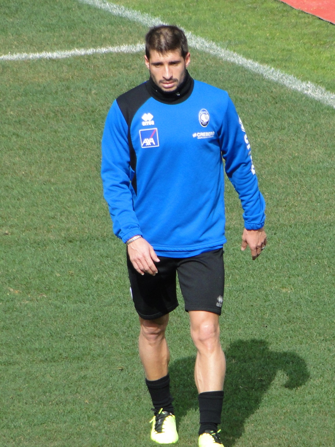 Franco Brienza, calciatore italiano